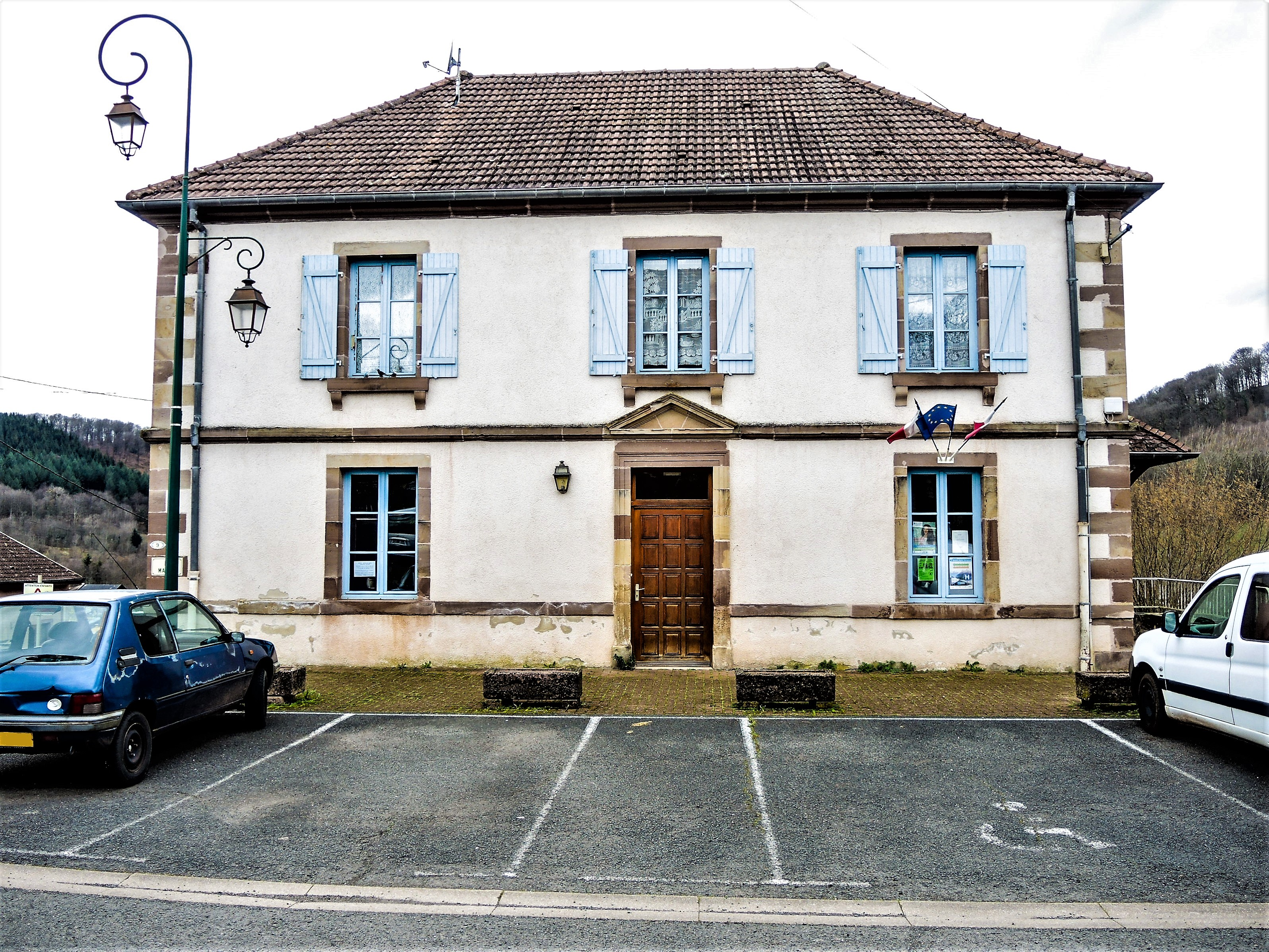 Mairie